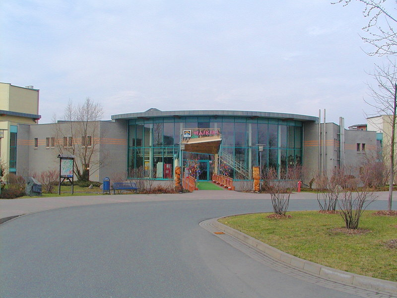 Eingang der Badewelt-Waikiki in Zeulenroda